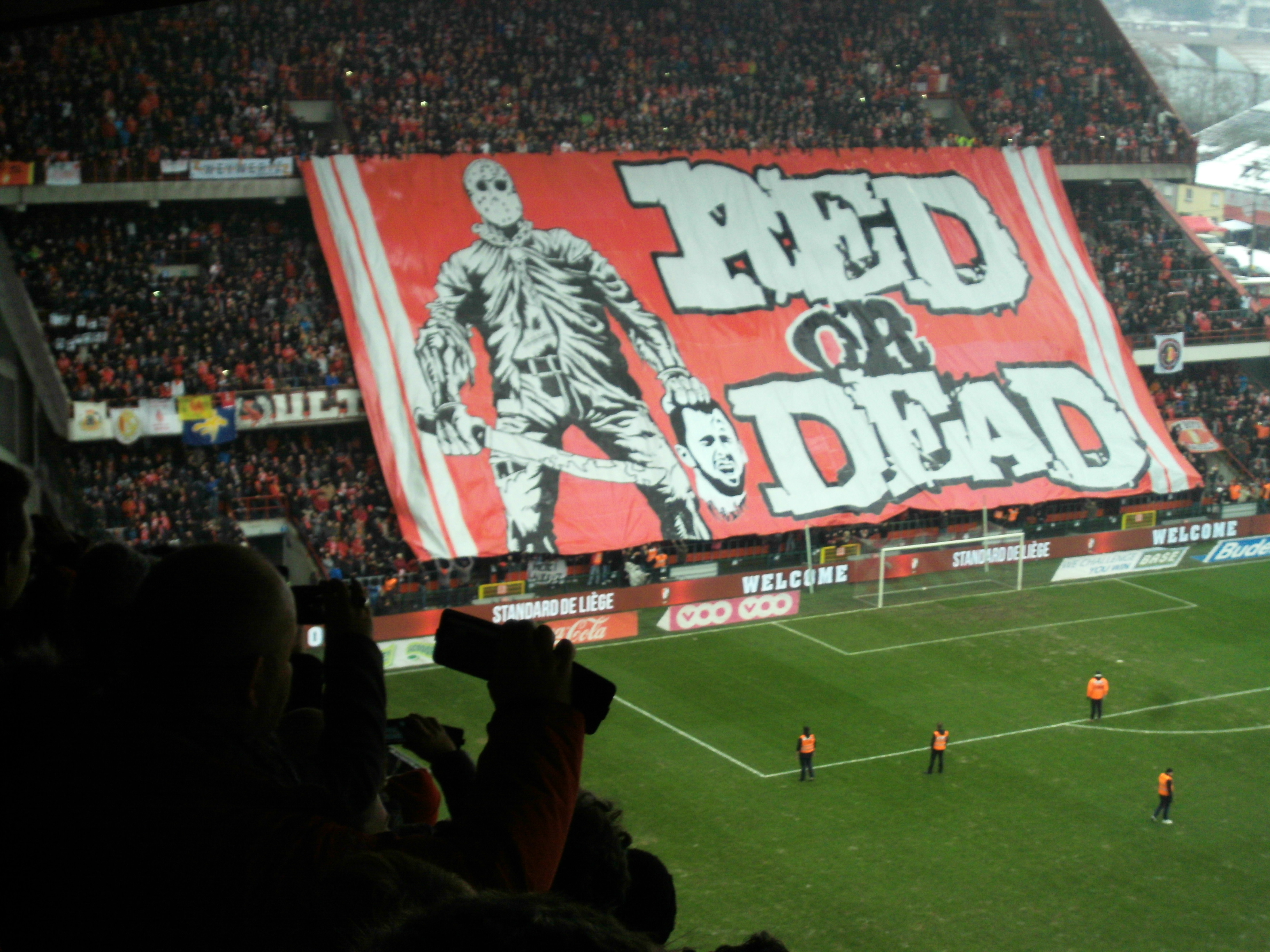 "Tiffo Steven Defour" lors du match Standard de Liège - Anderlecht 2015